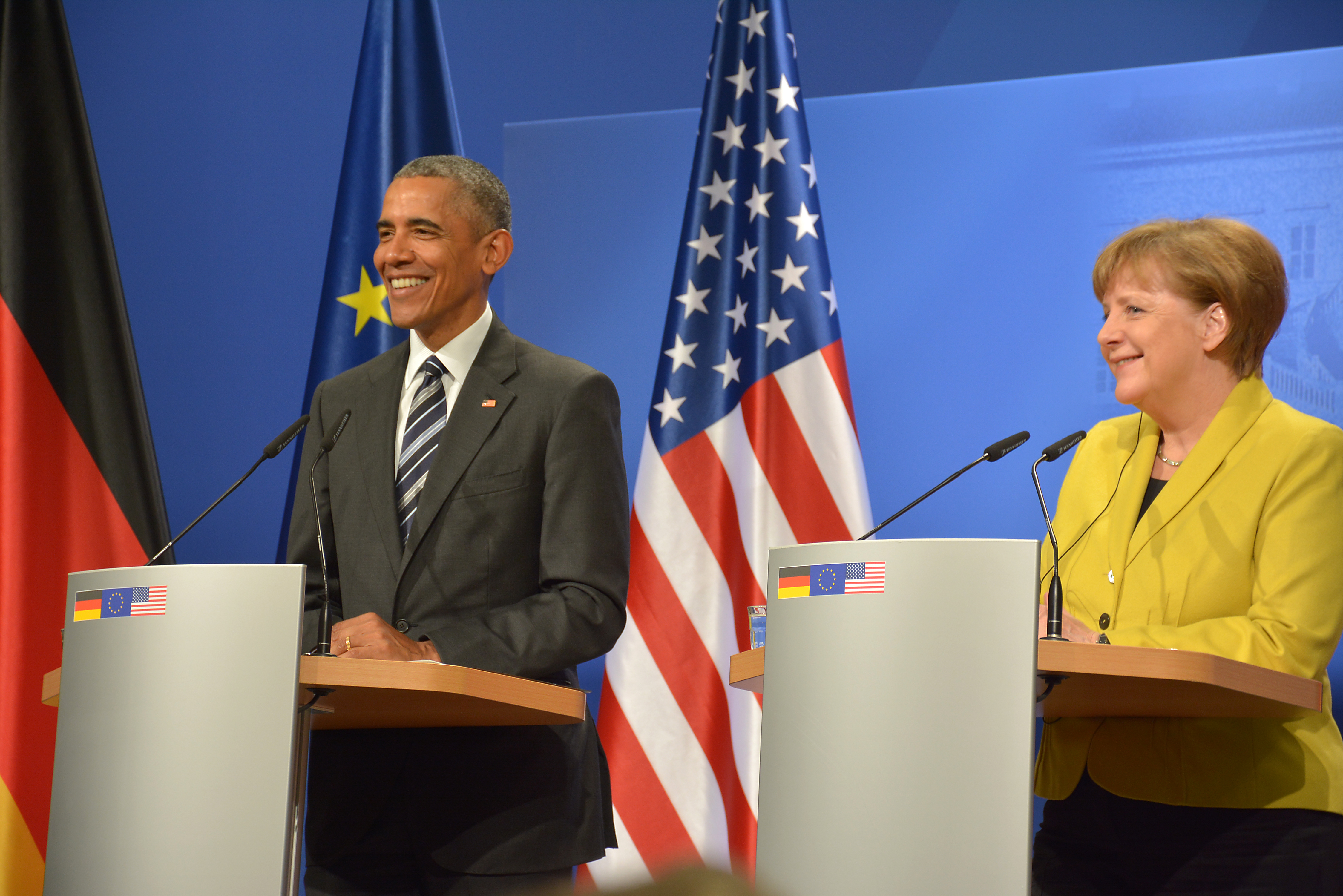 Pressekonferenz von Bundeskanzlerin Merkel und US-Präsident Obama am ersten Besuchstag, 24.04.2016, im Schloss Herrenhausen in Hannover.